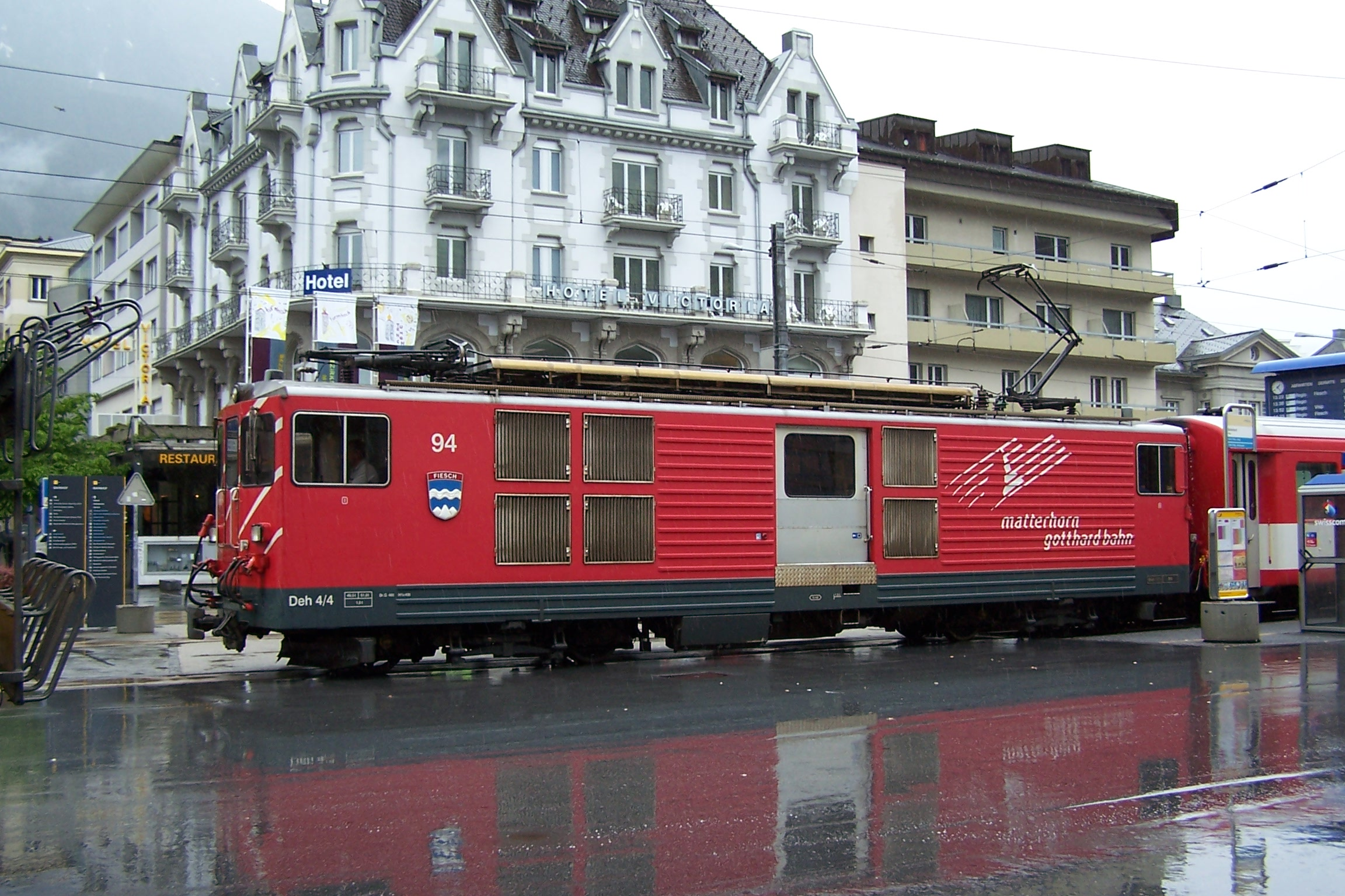 MGB Deh 4/4 94 in Brig bei der Abfahrt Richtung Andermatt